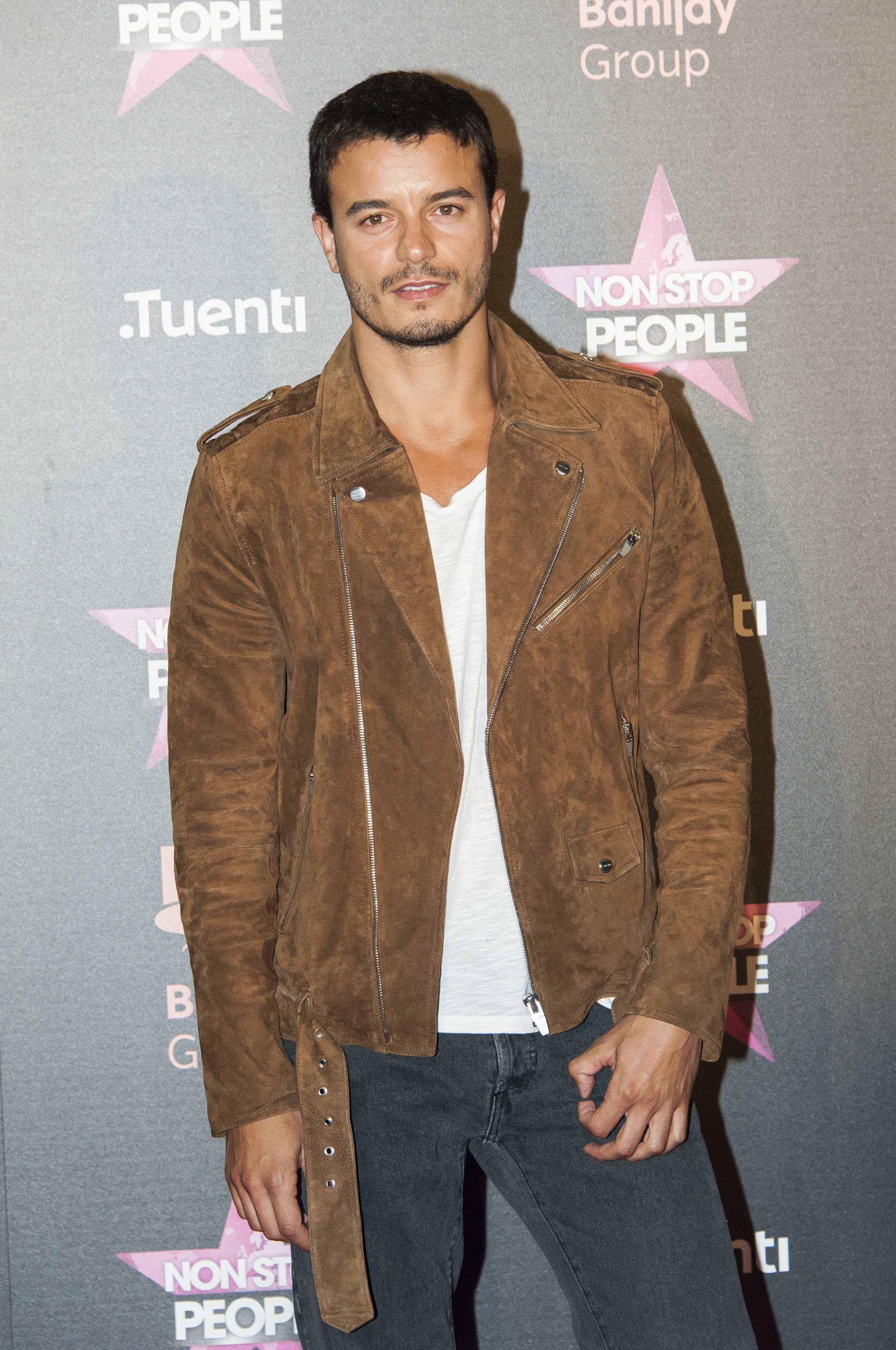 Fotos del photocall y fiesta de lanzamiento de un nuevo canal de televisión en España.